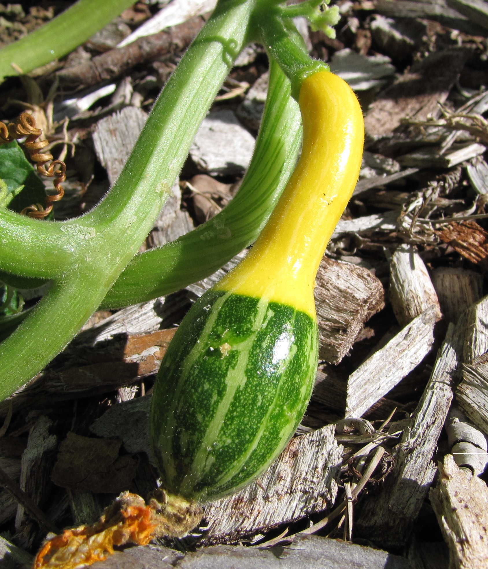 Cucurbita pepo var. ovifera, fruit and plant